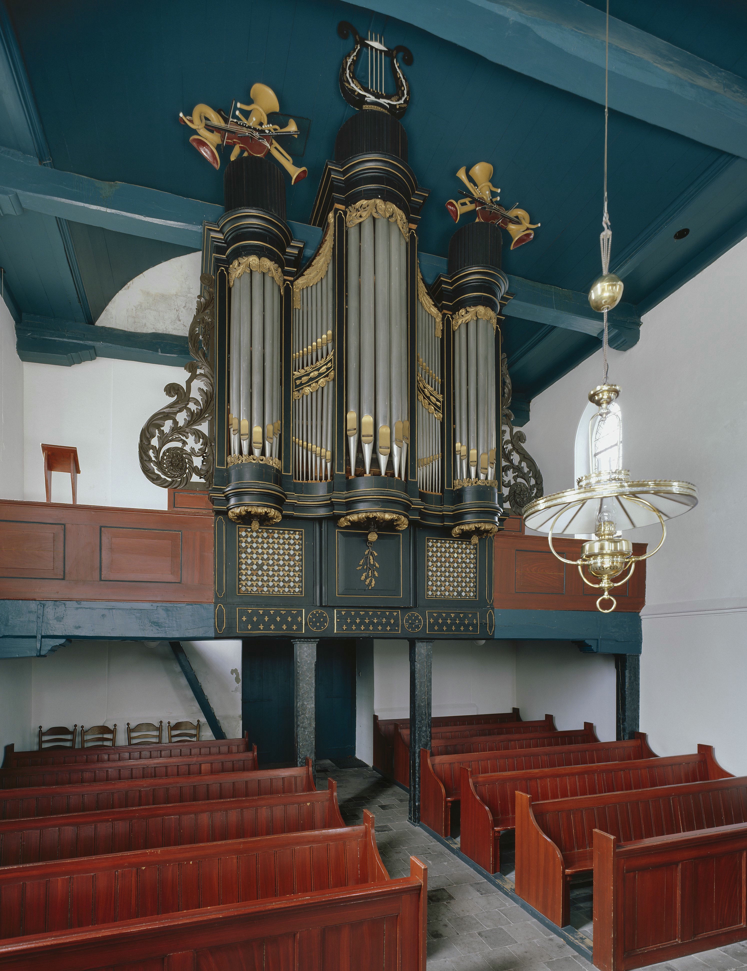 Nederlands Hervormde Kerk: Interieur, aanzicht orgel, orgelnummer 1898 (opmerking: Gefotografeerd voor Het Historische Orgel in Nederland 1865-1872)